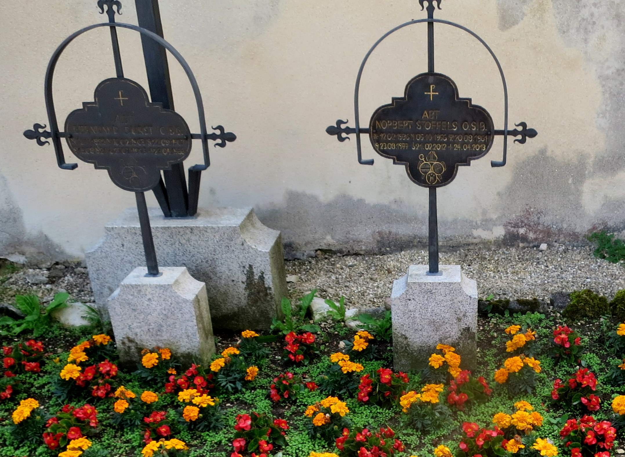 Gräber von zwei Äbten